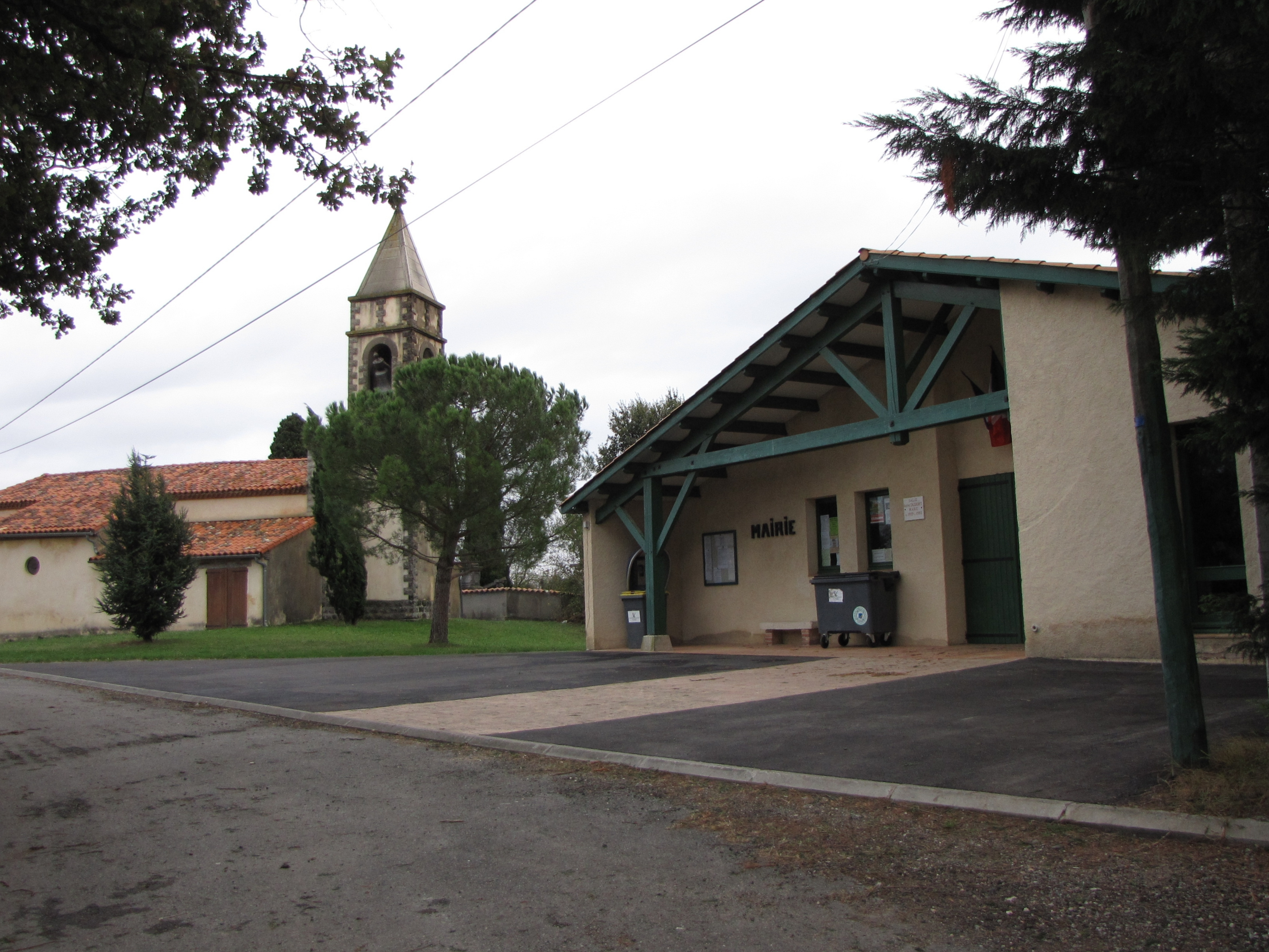 Mairie de Lapeyrère